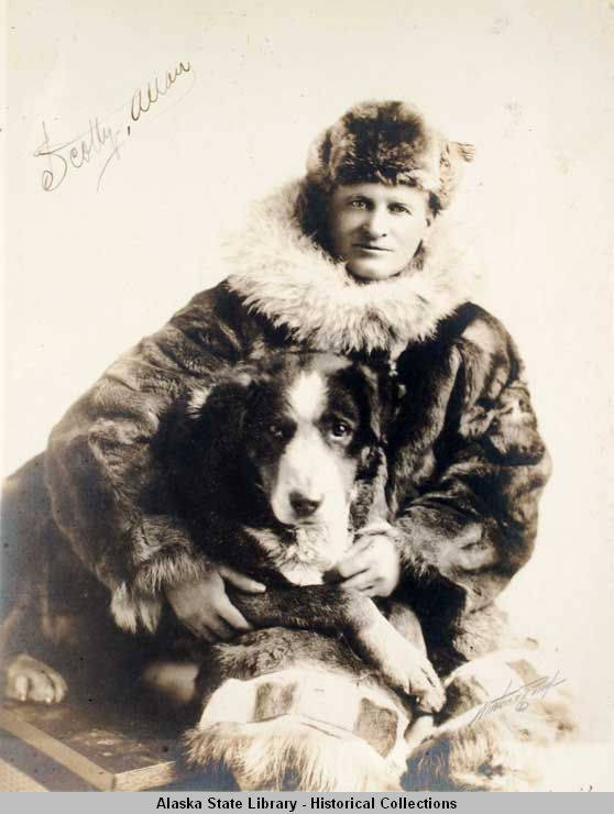 Scotty Allan (1967-1941) et son chien Baldy